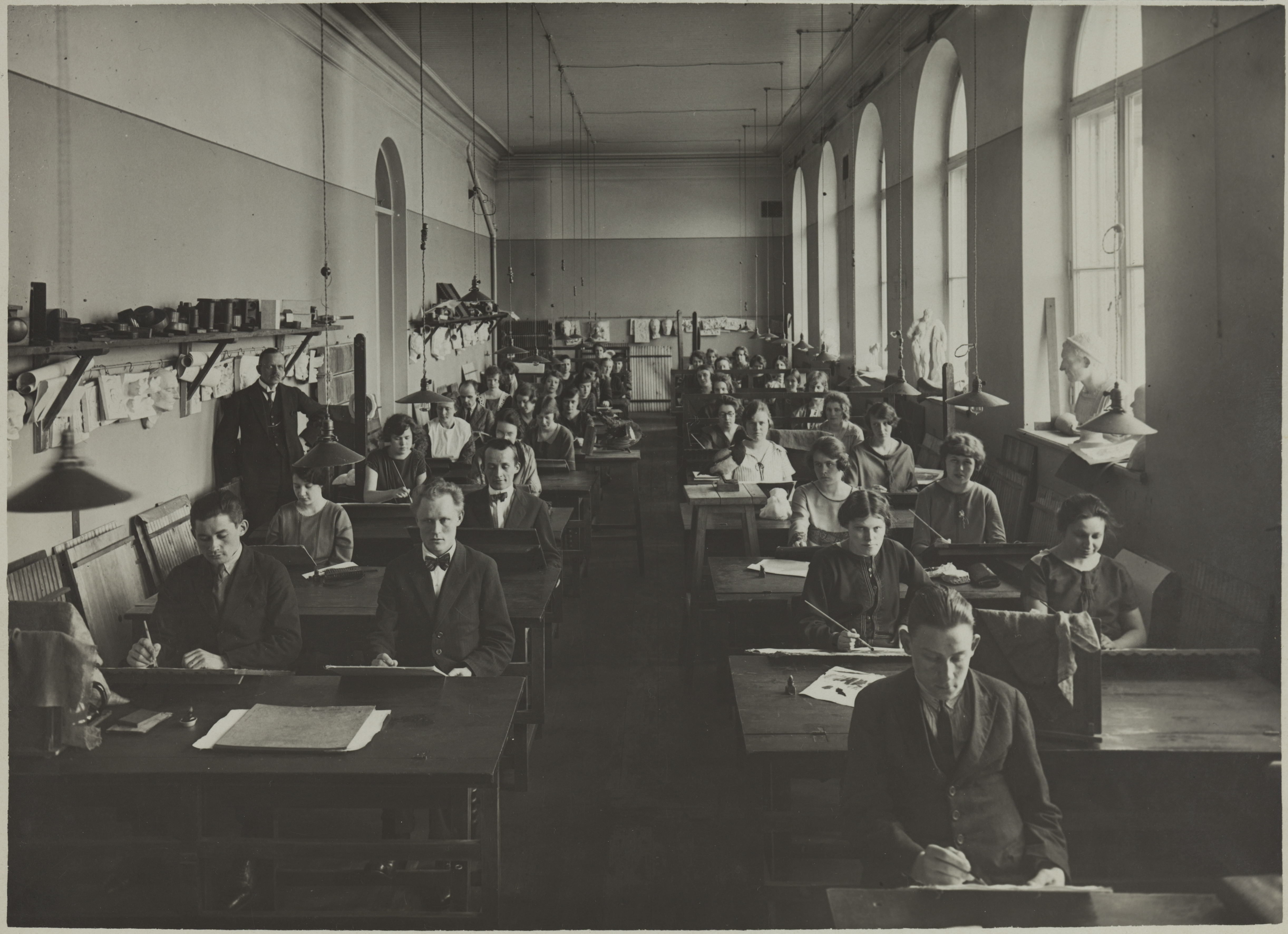 Käsivarapiirustuksen opetustilanne, opettaja Werner Von Essen, 1920-luku. Aalto-yliopisto / Aalto University Tiedätkö lisää tästä kuvasta? Jätä kommentti tai ota yhteyttä sähköpostitse: Lisätietoja kuvakokoelmista / more information